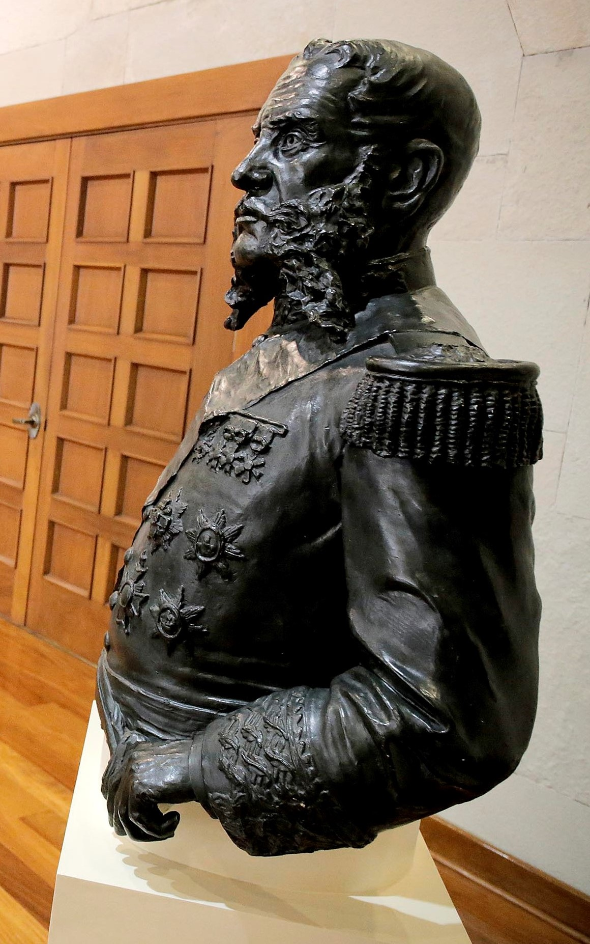 El ministro de Defensa, Pedro Cateriano, sostuvo una reunión de trabajo con el Contralor General de la República, Fuad Khoury, para revisar el proceso de adquisiciones que realizaron el Ministerio de Defensa, el Ejército, la Marina y la Fuerza Aérea, en el periodo comprendido entre los años 2012 al 2014.